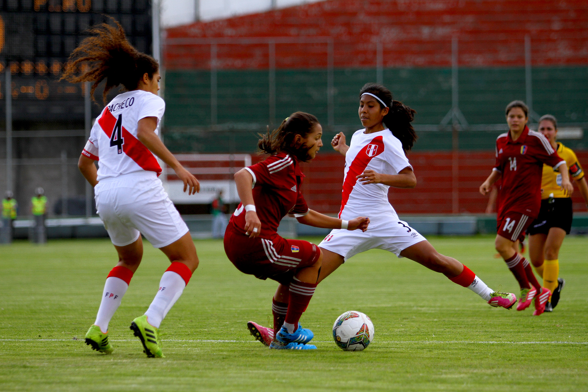 Ambato (Tungurahua), 17 de septiembre (Andes).- Copa América Femenina Ecuador 2014. Perú (blanco) vs Venezuela (vino). Foto: Luis Astudillo C. / Andes